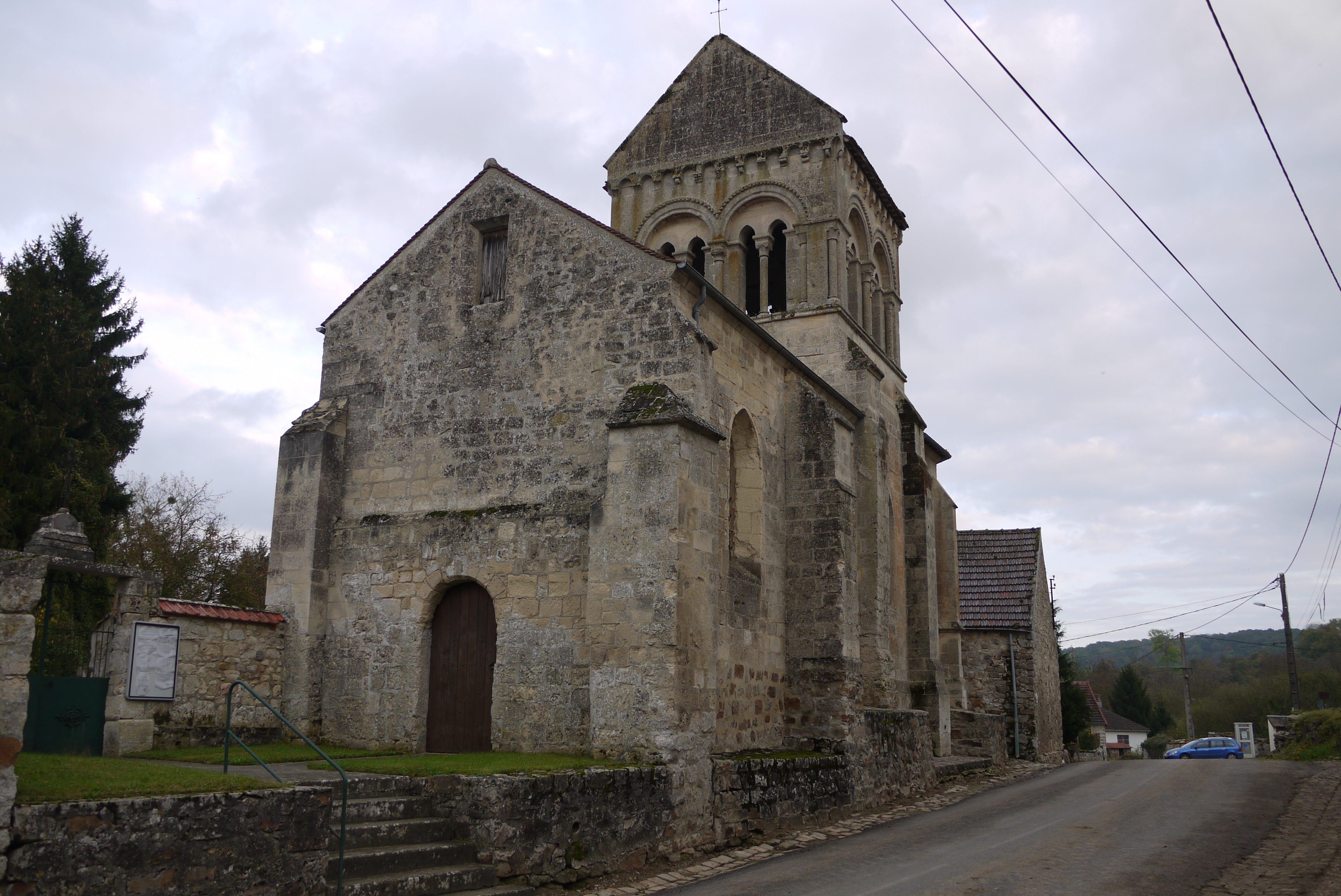 Église Saint-Crépin-et-Saint-Crépinien de Vichel